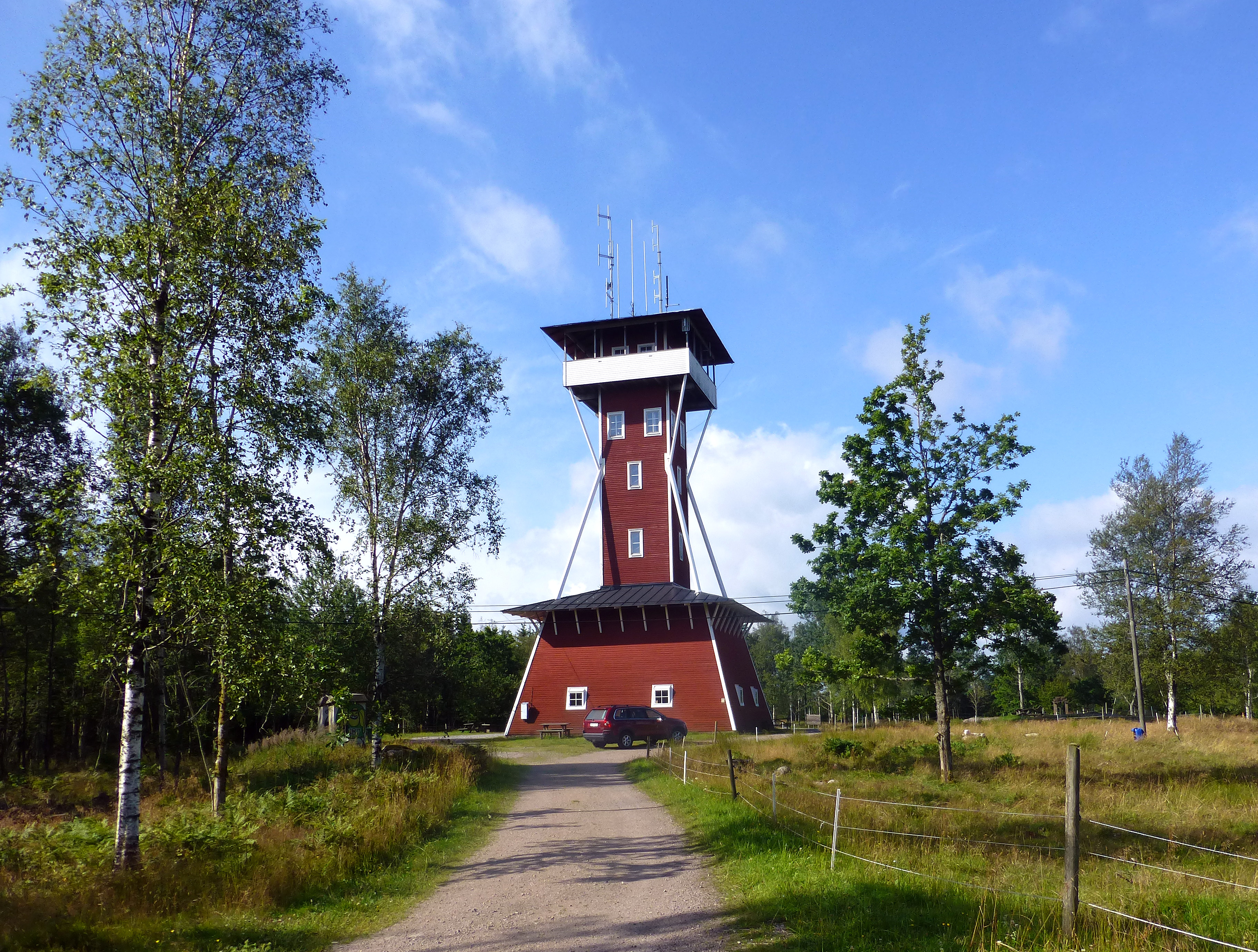 Udsigtstårnet på toppen af Kinnekulle , i Götene kommun i landskapet Västergötland i Sverige.